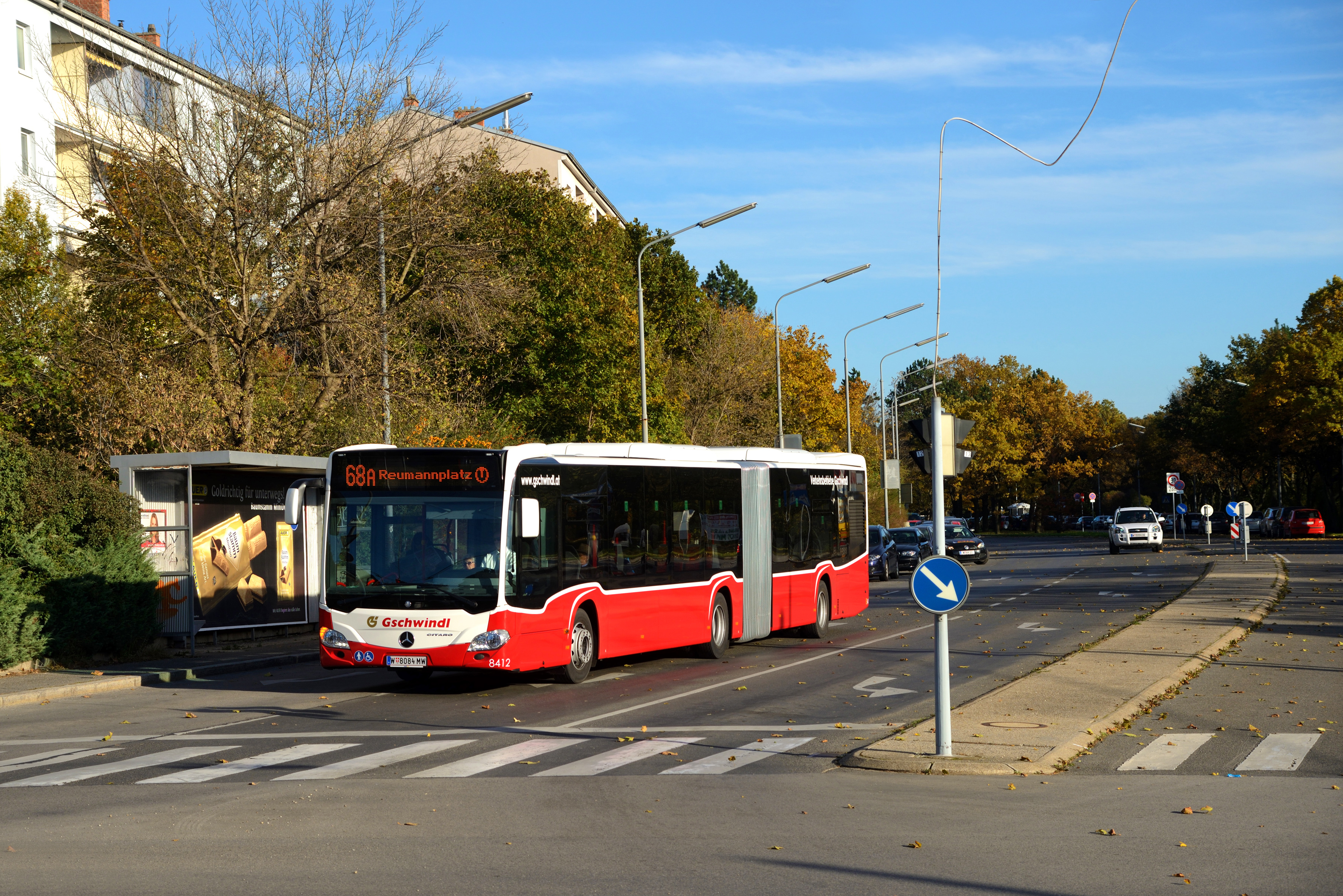 Mercedes Citaro C2 G 8412 der Verkehrsbetriebe Gschwindl als Linie 68A in der Filmteichstraße.